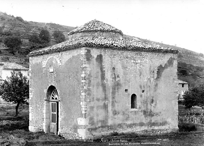 Côté Sud-Est du baptistère dit le Panthéon (chapelle circulaire) de Riez par Séraphin-Médéric Mieusement.